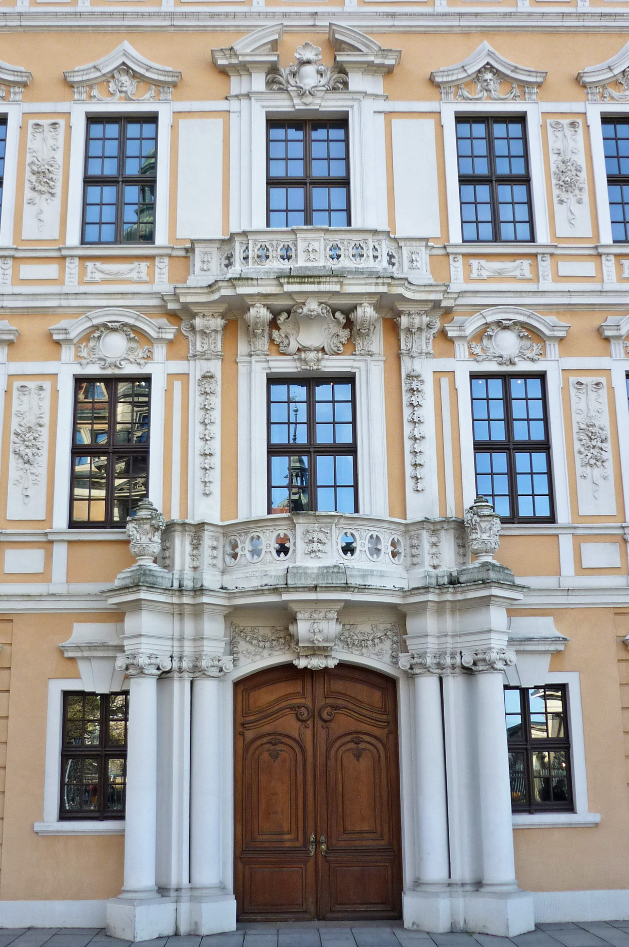 Portal des Taschenbergpalais in Dresden